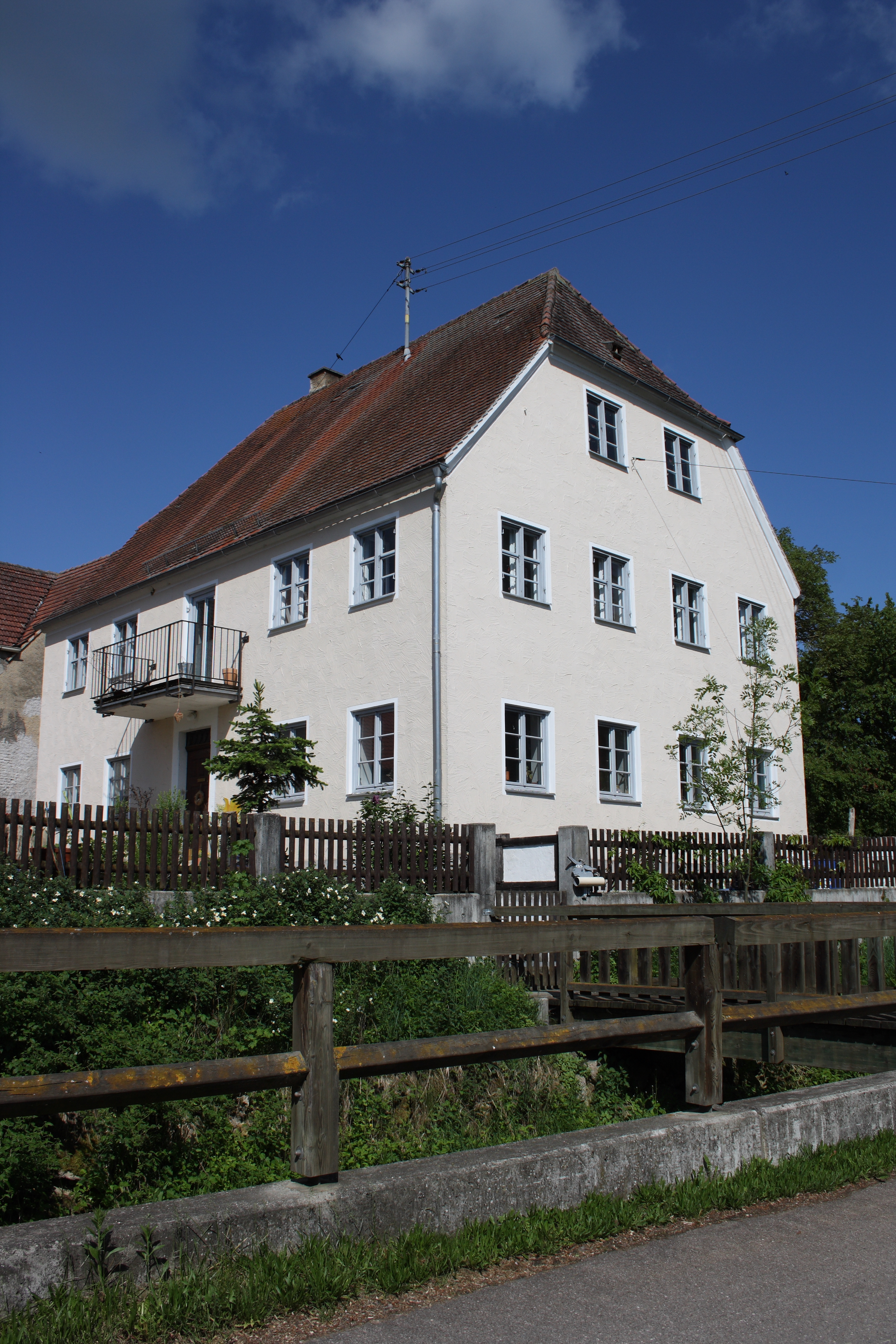 Ehemaliges Pfarrhaus in Schwennenbach, Ortsteil von Höchstädt an der Donau. Kugelbachweg 1